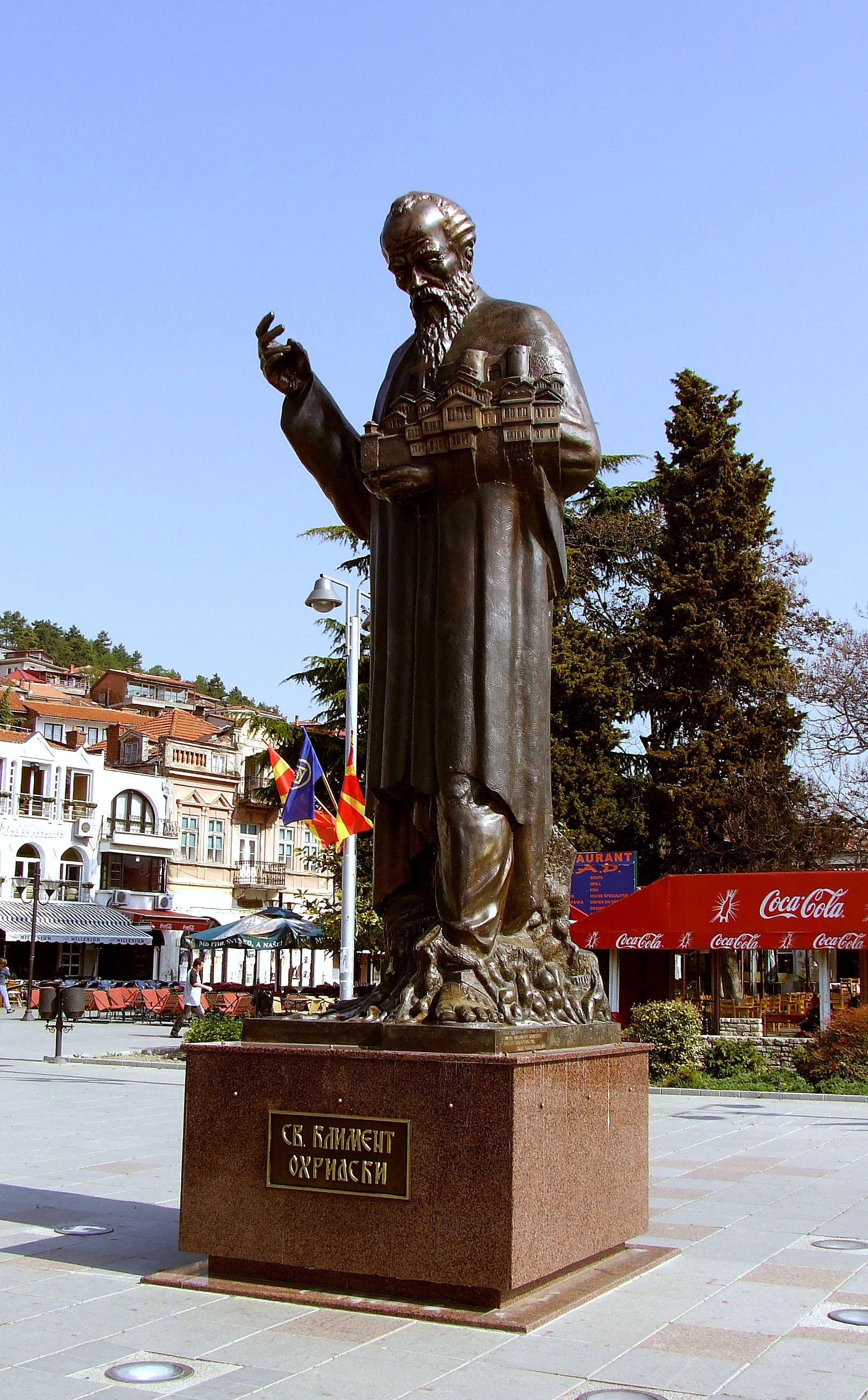 Sveti Klement Ohridski z maketo mesta